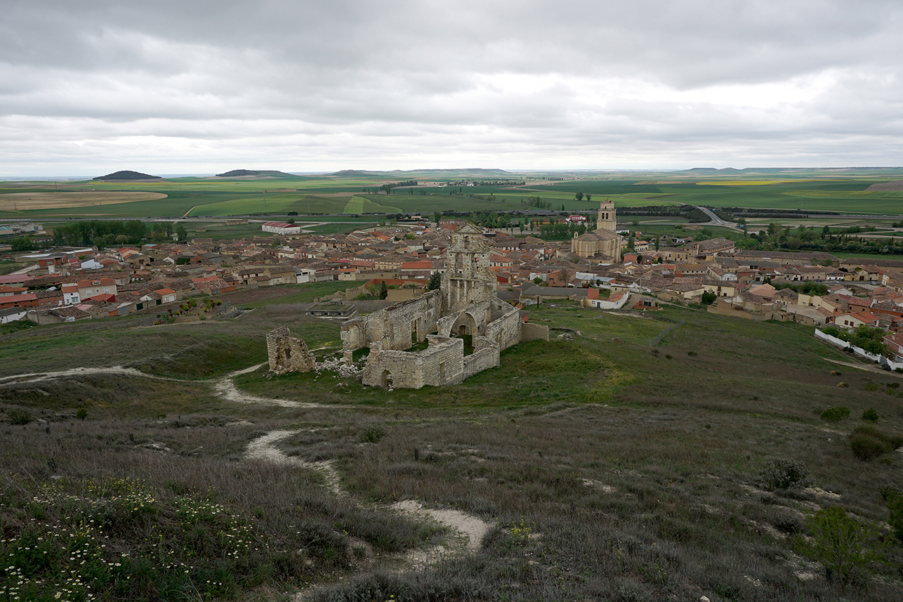 PAnorámica en la que se aprecia Mota del Marqués y la subida a la torre desde la plaza mayor